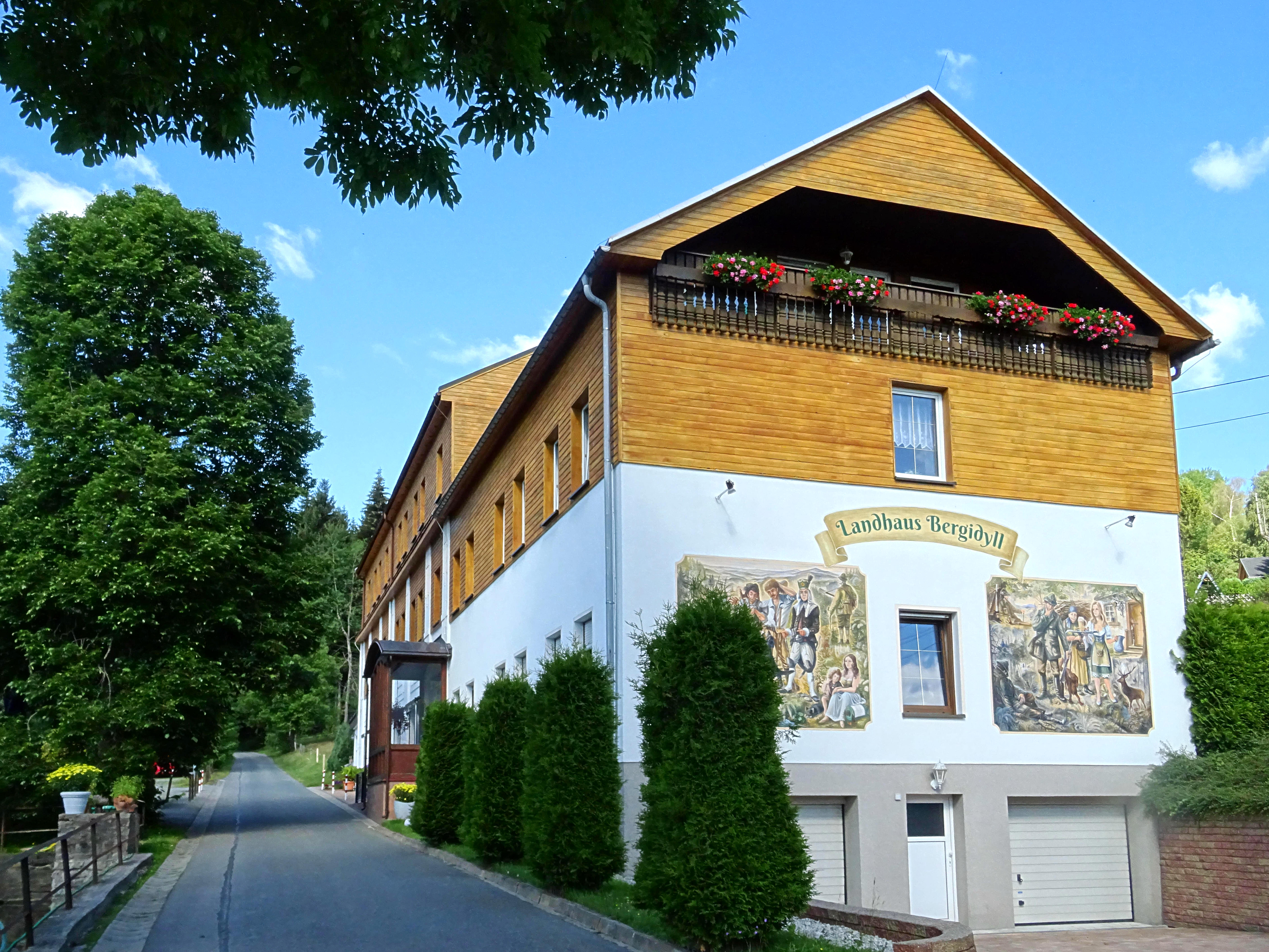 Niederschlag Landhaus Bergidyll: Das Gebäude wurde 1888 von Adolf Schmiedel als Postamentenmanufaktur errichtet. Im Jahr 1925 aufgestockt und erweitert erfolgte im Jahr 1972 die sozialistische Zwangsenteignung. Im Jahr 1975 wurde die Produktion eingestellt und es begann der Verfall.Ab 1985 wurde das Gebäude als Ferienhaus umgebaut. Im Jahr 1991 erfolgte die Eröffnung. Inzwischen neu modernisiert und saniert ist es ein gemütliches Landhaus mit Wohlfühlcharakter am Waldrand.